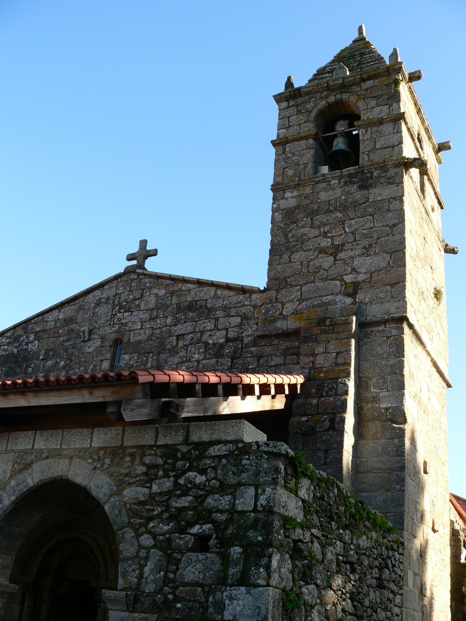 Fisterra, A Coruña, Spain